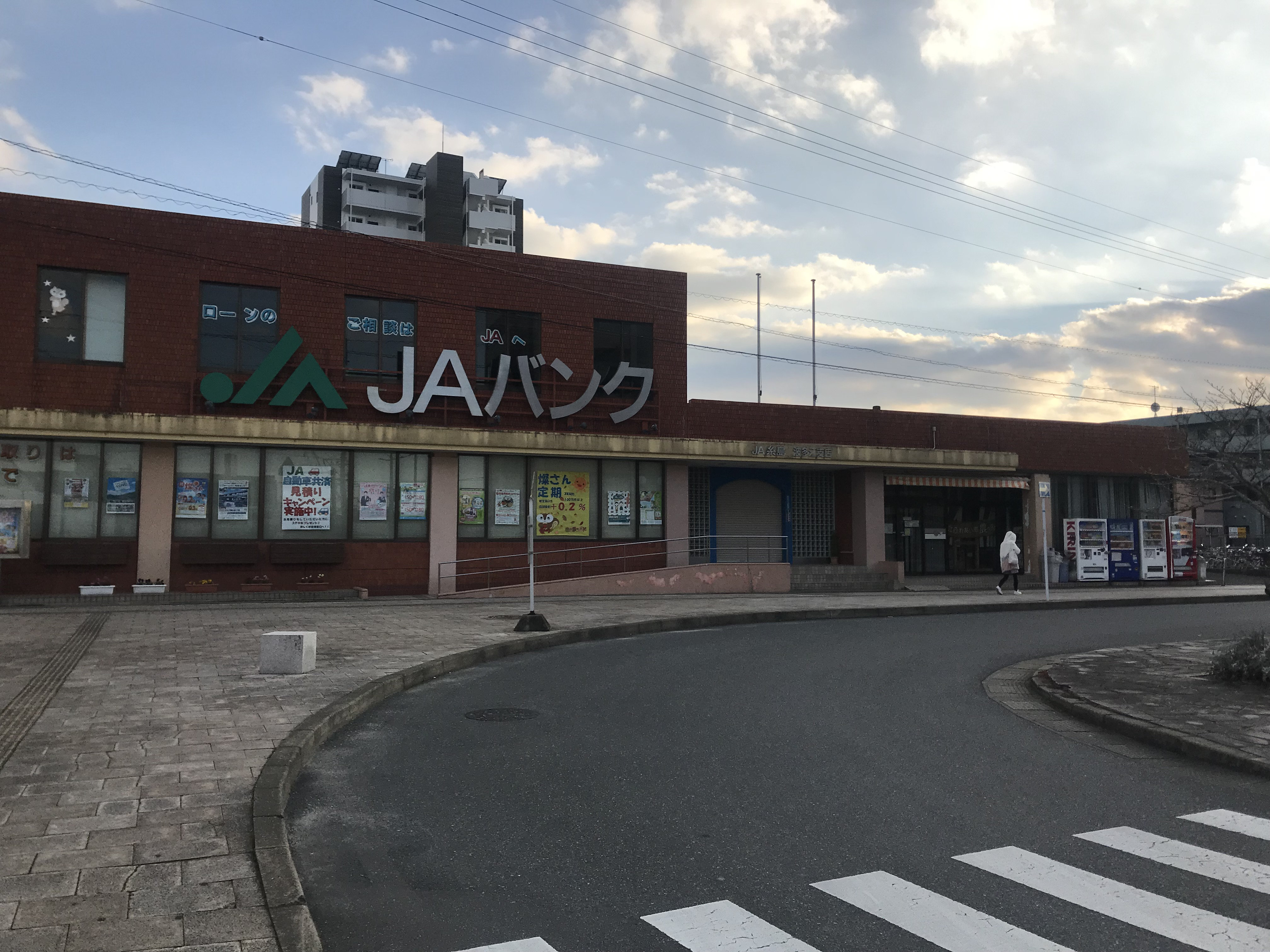 JA糸島波多江支店